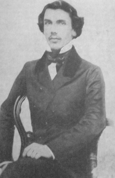 José Evaristo Uriburu (en su juventud